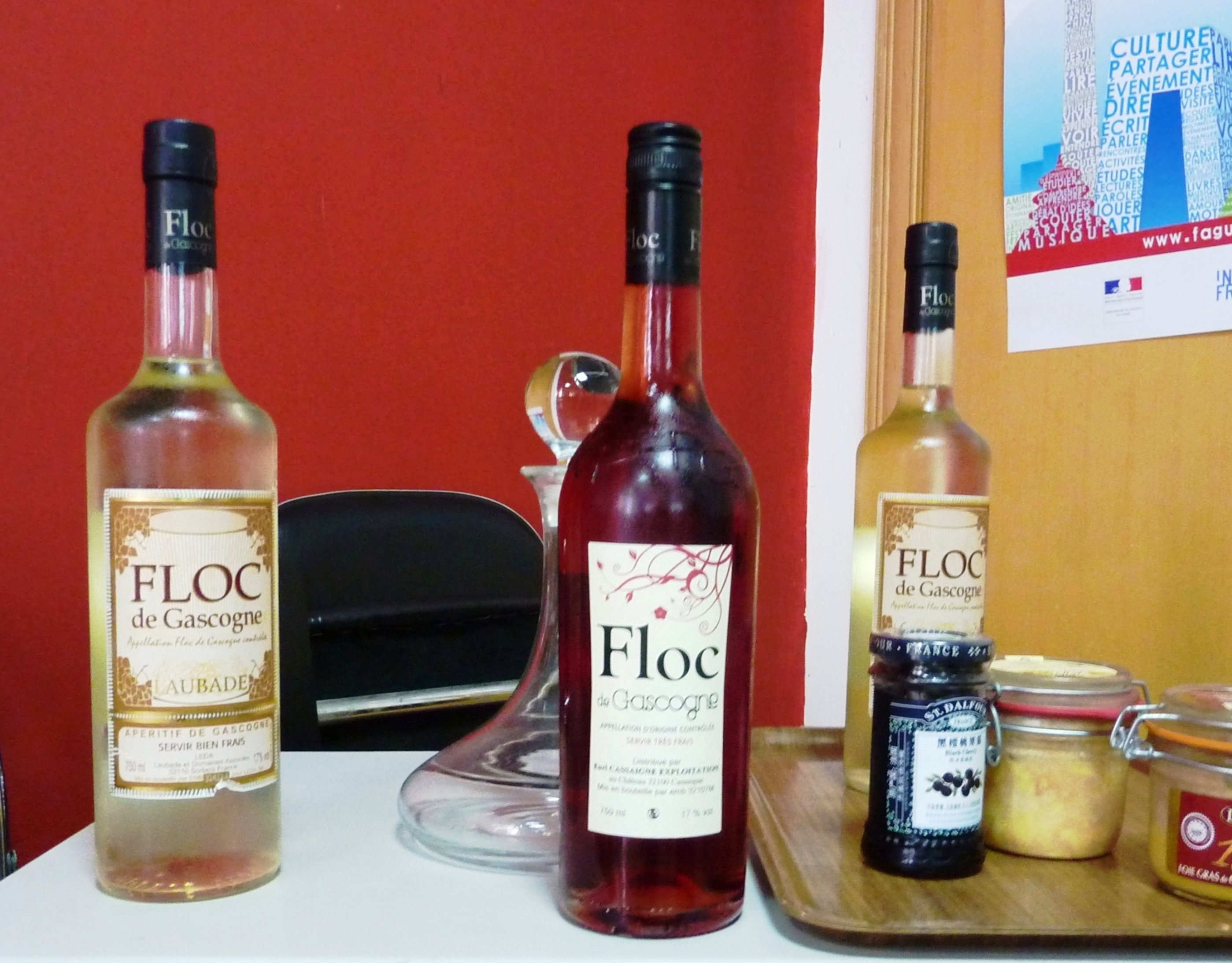 Floc de Gascogne à l'Alliance française de Wuhan (